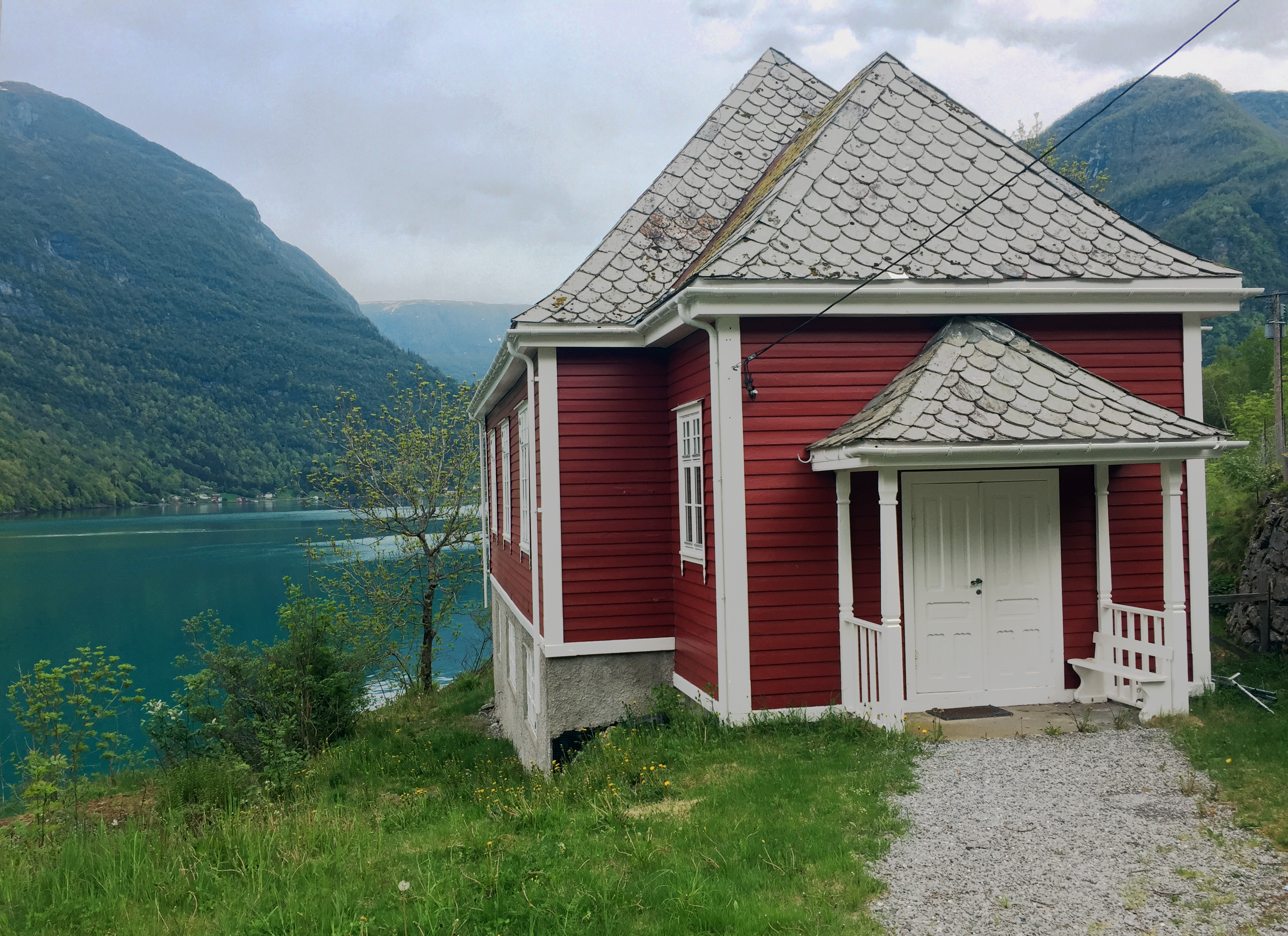 Ungdomshuset på Nese i Arnafjord, bygt 1921. Noko tilklypt og lett justert for vanskelege lystilhøve.